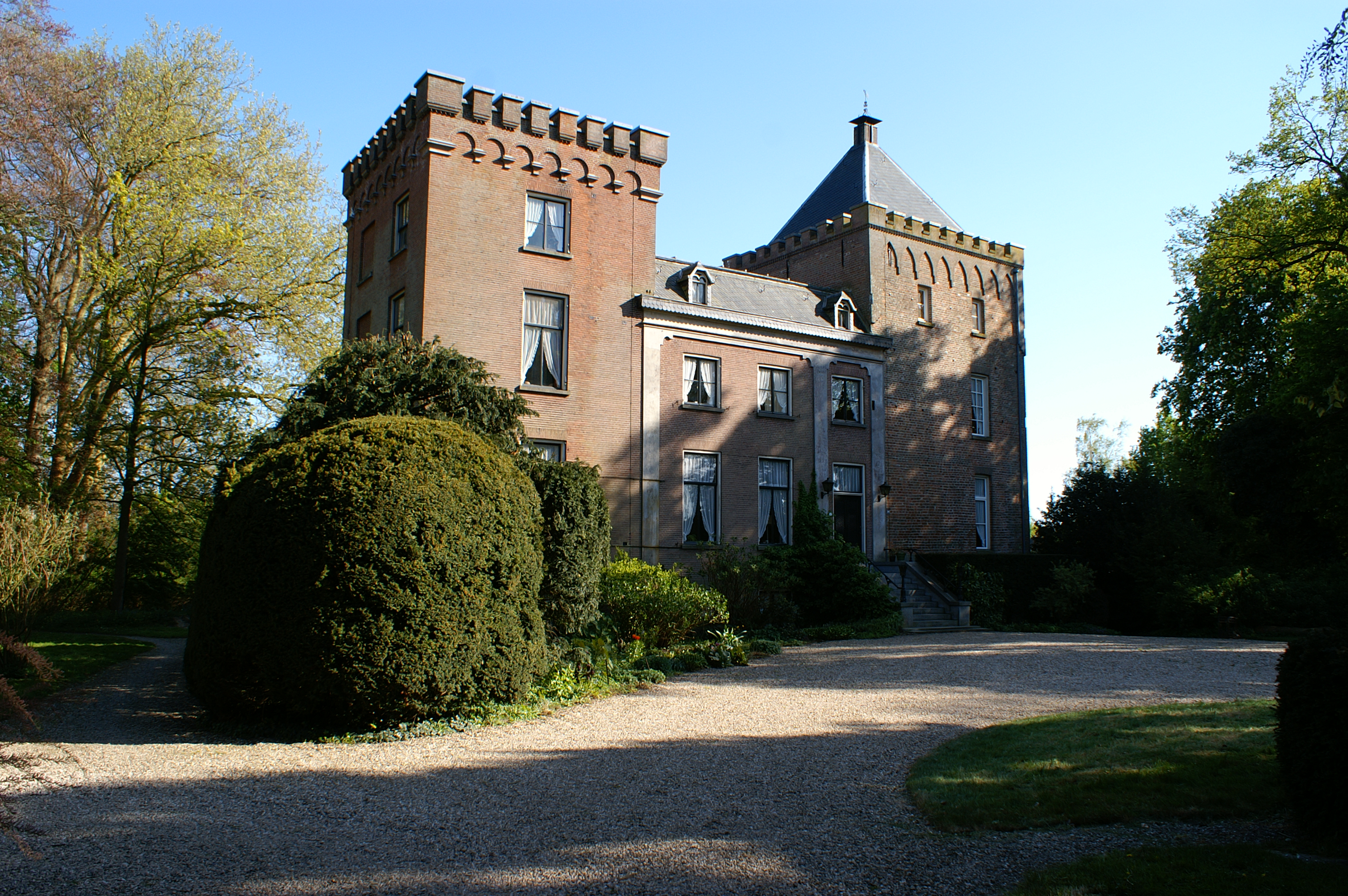 Kasteel Rhijnestein te Cothen.